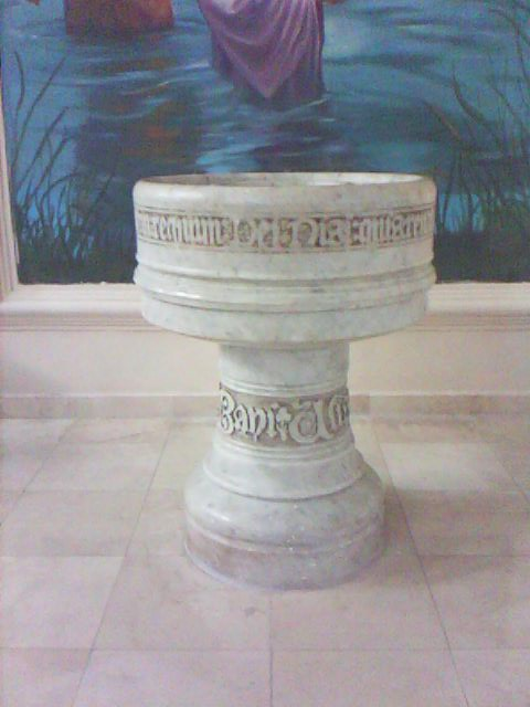 pila bautismal de la catedral Nuestra Señora de Regla, donada por Ulises Heureaux